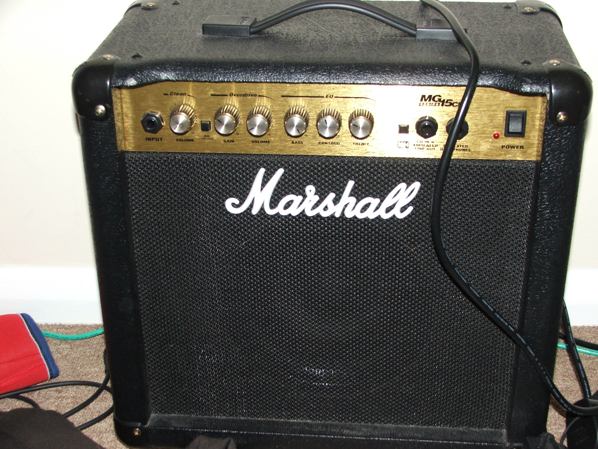 my amp